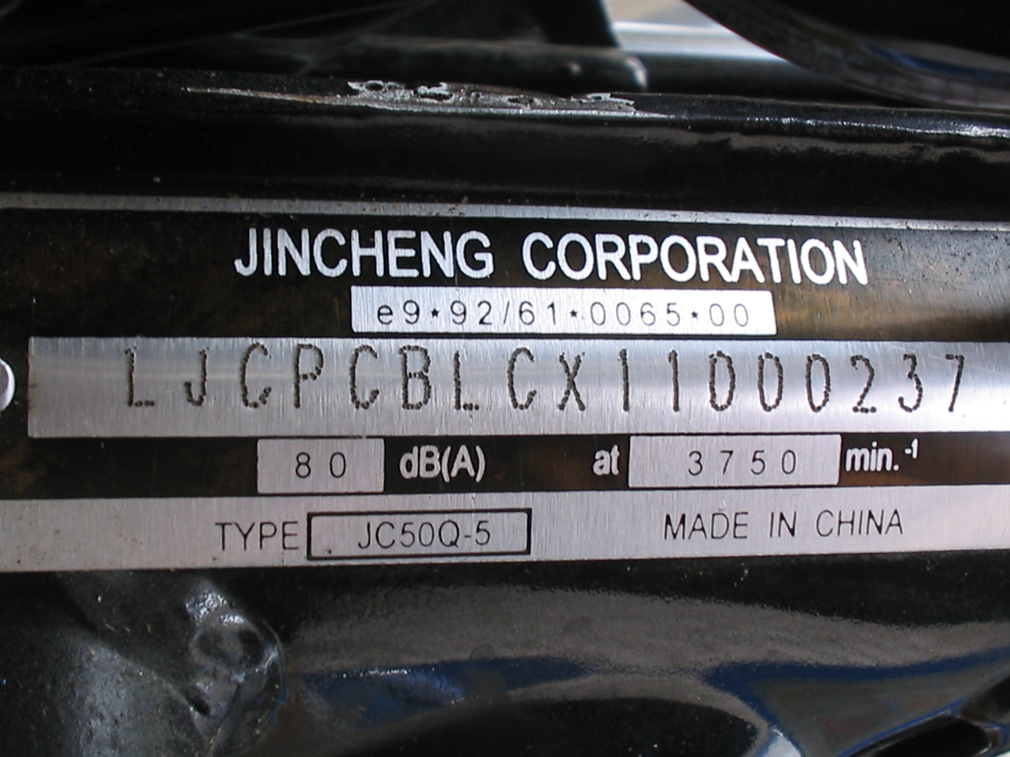 Voorbeeld framenummer bromfiets